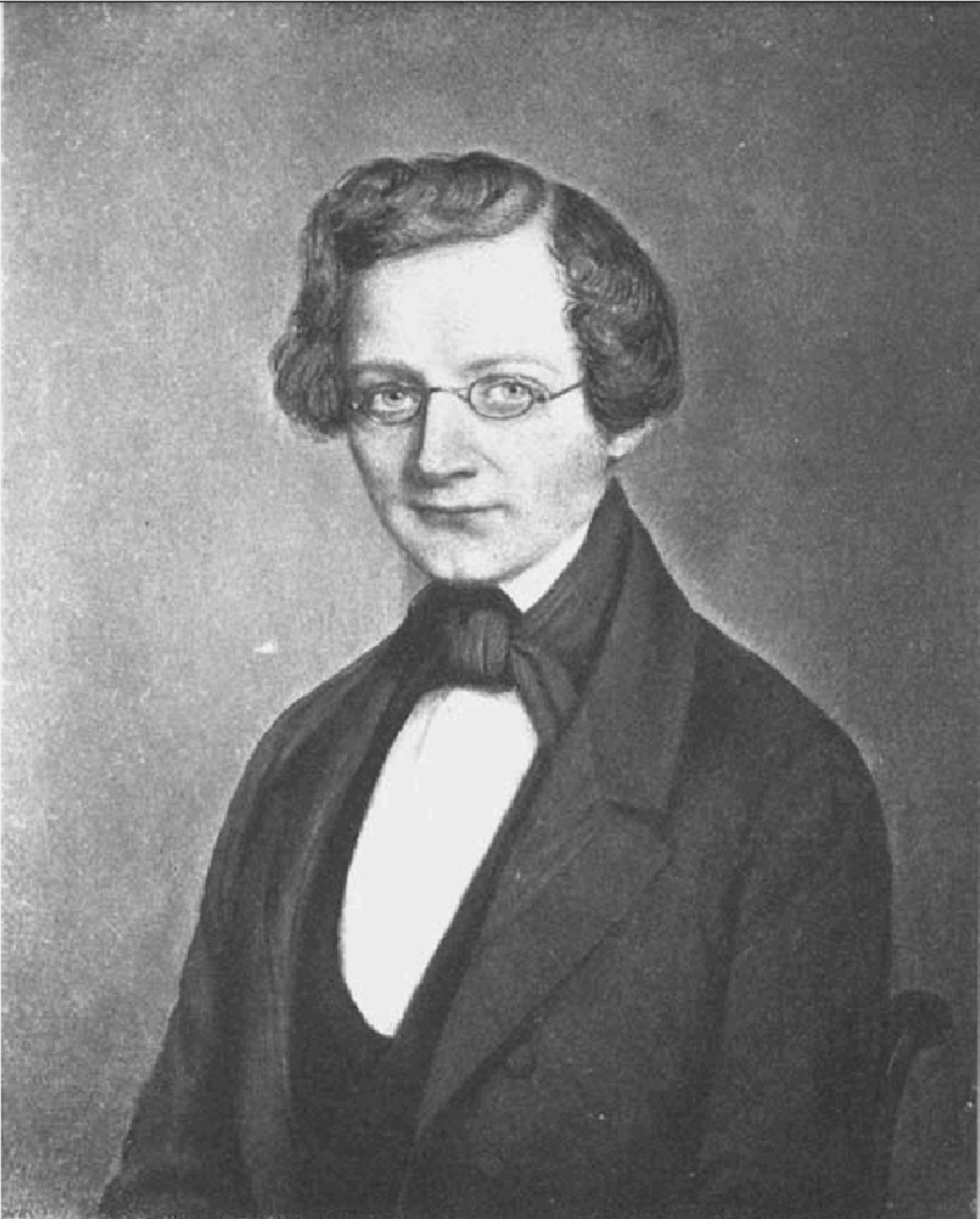 August Wilhelm (von) Hofmann (* 8. April 1818 in Gießen; † 5. Mai 1892 in Berlin)